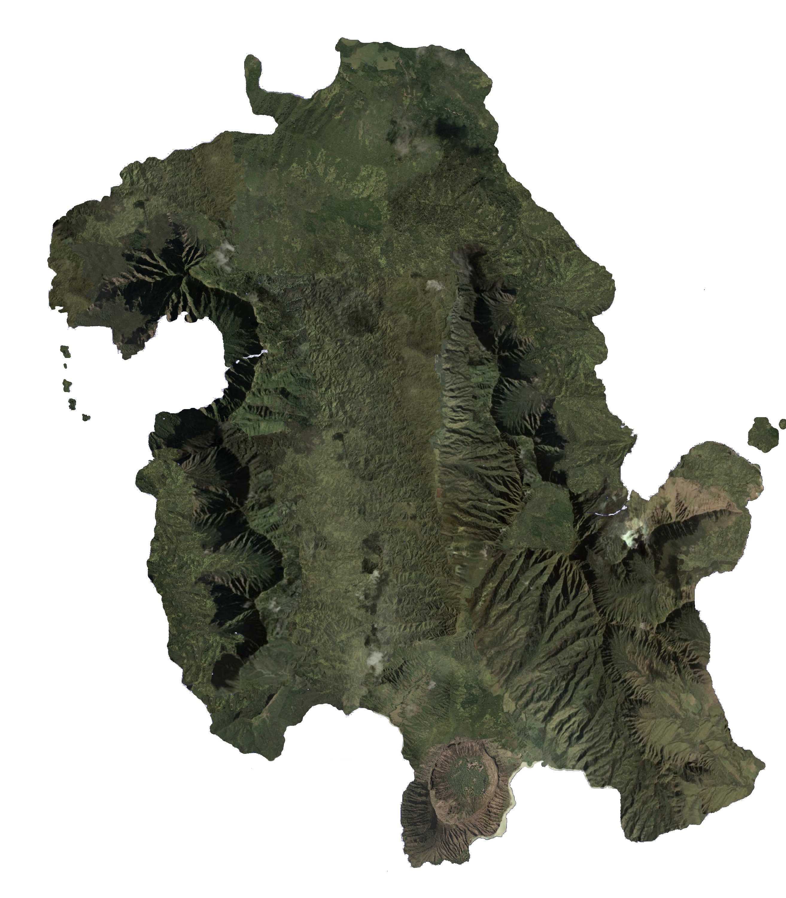 L'île de LOST que j'ai créée moi-même